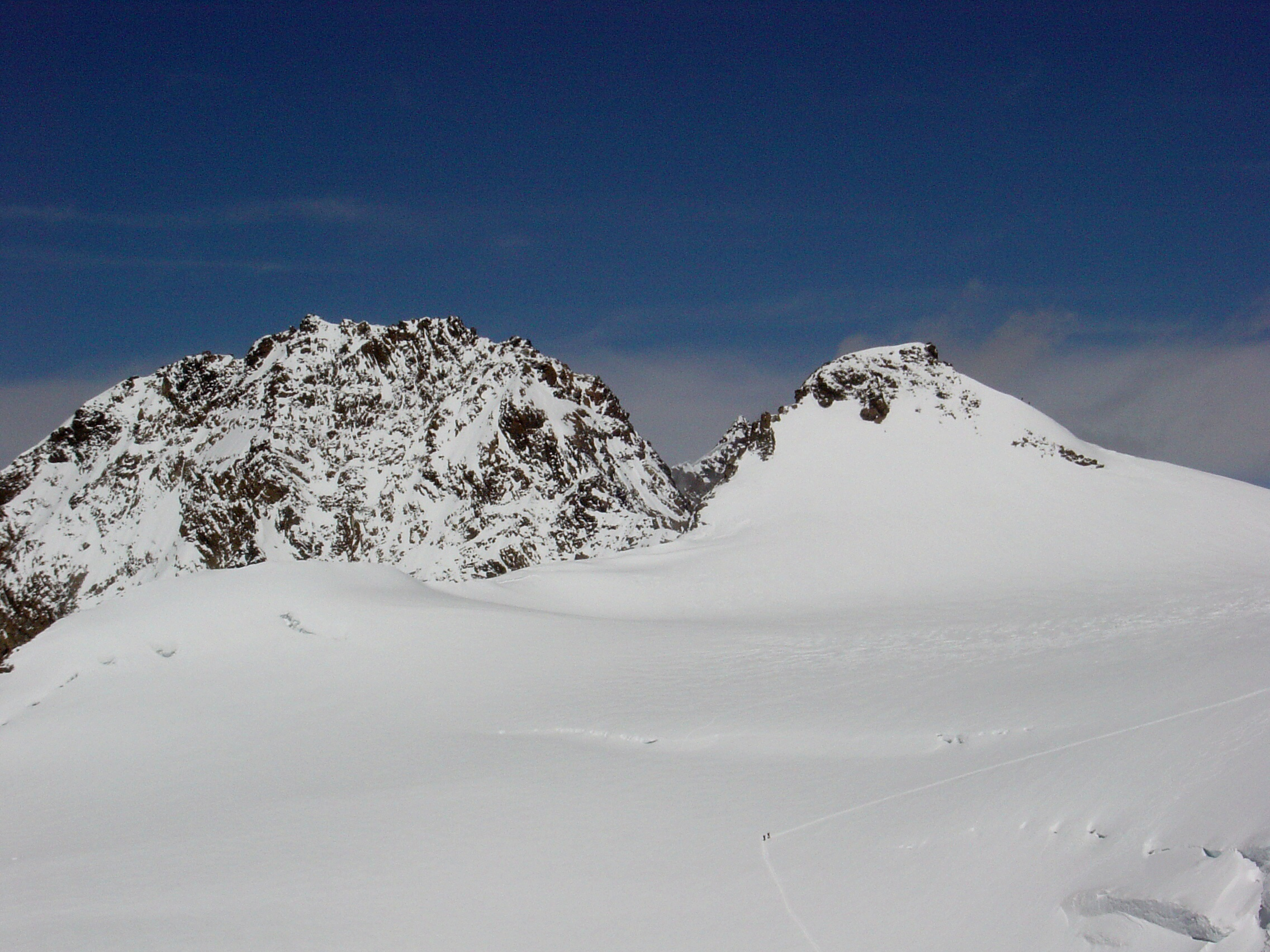 Dufourspitze (left) and Zumsteinspitze (right), view from Parrotspitze